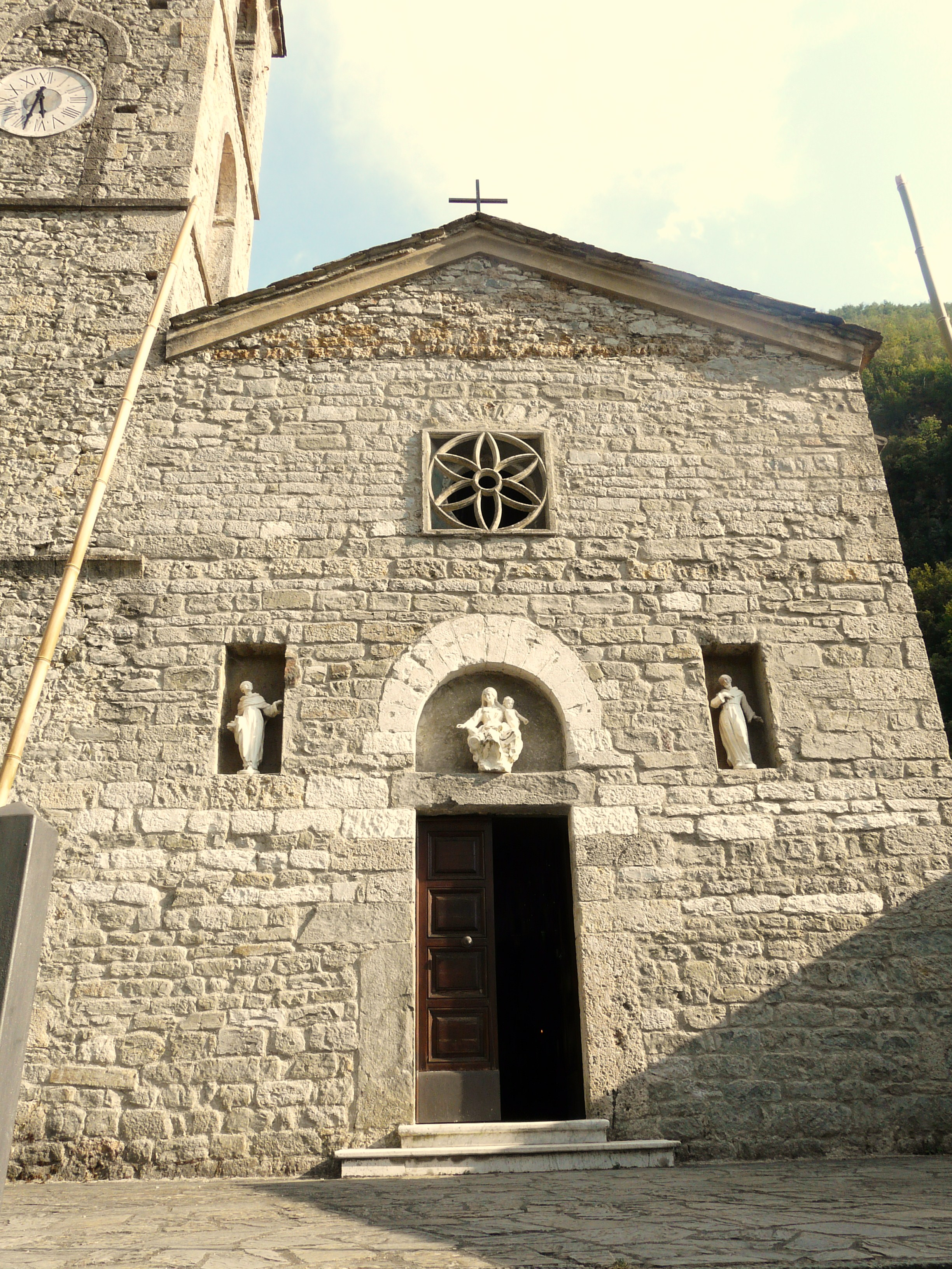 Chiesa di Equi Terme, Fivizzano, Toscana, Italia